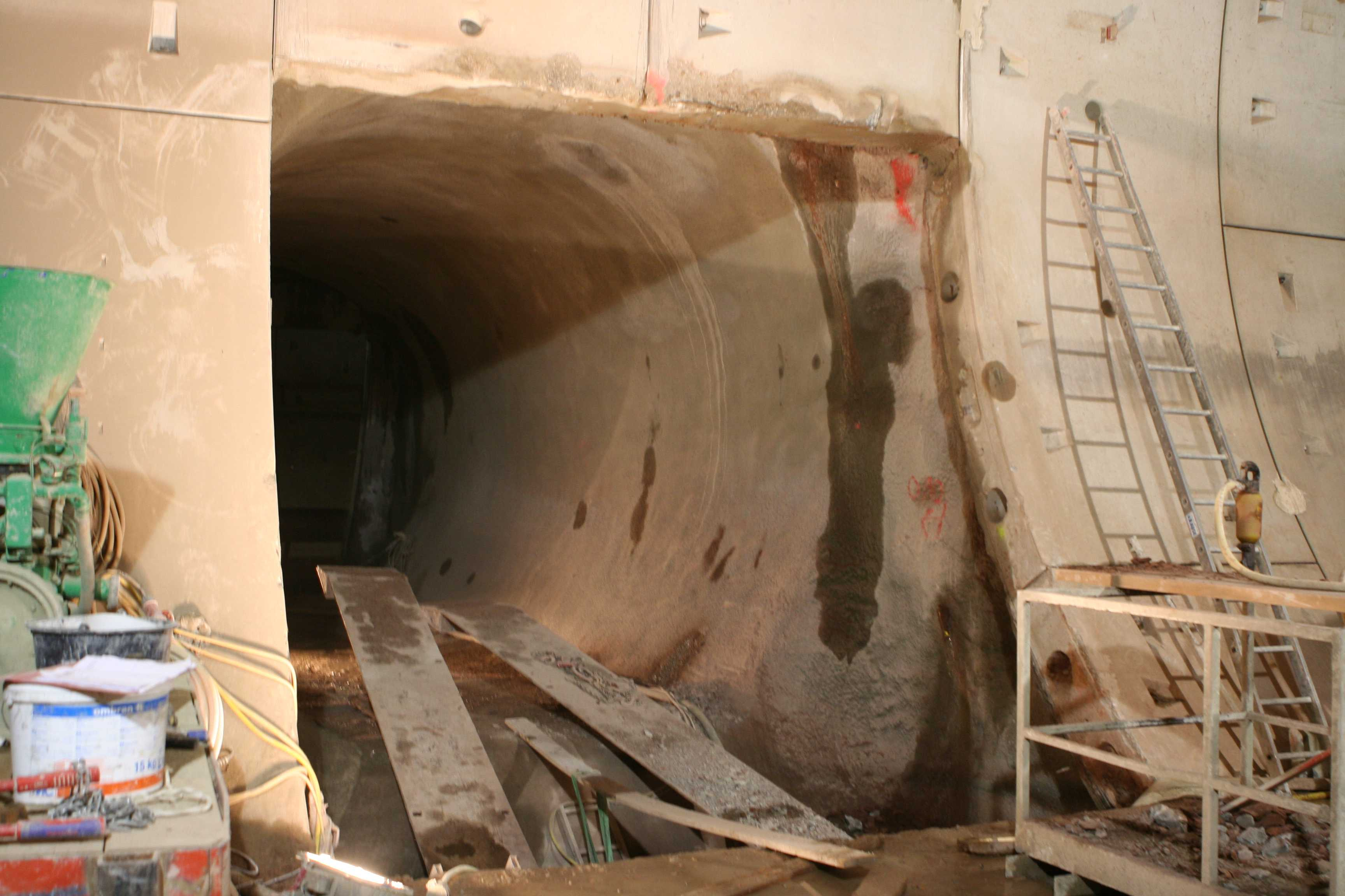 Finnetunnel